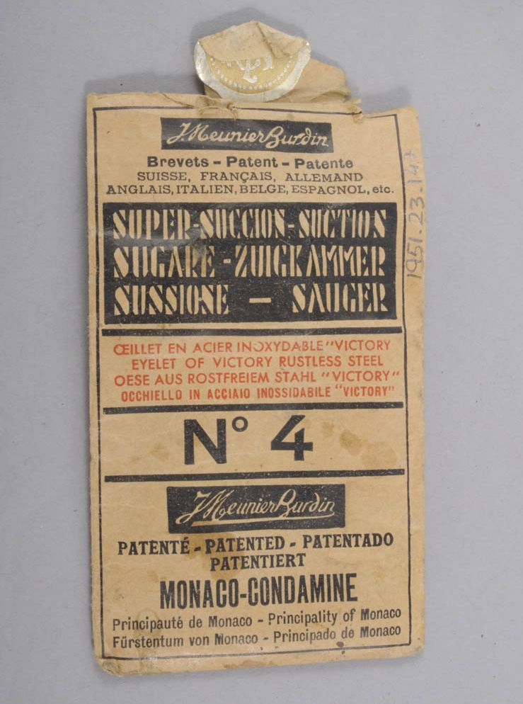 Bon état général ; 18/11/2010; Original caption: “Sachet imprimé sur les deux faces rectangulaire s’ouvrant par la largeur.”